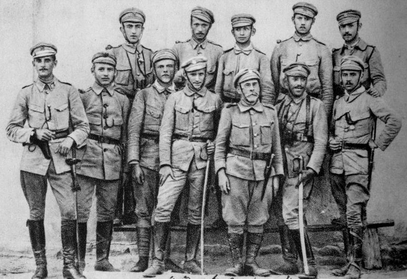 II pluton Pierwszej Kompanii Kadrowej w Krakowie. Dolny rząd od lewej: Modest Słoniowski ps. „Słoń”, sierż. Kazimierz Strzelecki ps. „Kazik” (lub sierż. Zygmunt Pomarański ps. „Brzózka”), ppor. Mieczysław Marusieński ps. „Lelum”, sierż. Kazimierz Kamiński ps. „Luboń” (lub Sław Płoszajski ps. „Sławomir”), Wacław Sieroszewski, Krok-Paszkowski, Zygmunt Platonoff ps. „Plater”. Górny rząd od lewej: por. Bronisław Mansperl ps. „Haber”, Stefan Pomarański ps. „Borowicz”, Roman Szymański ps. „Tewański”, Wiktor Bystrzyński ps. „Skrzetuski”, Eugeniusz Czajkowski ps. „Jarzębie Marian”.